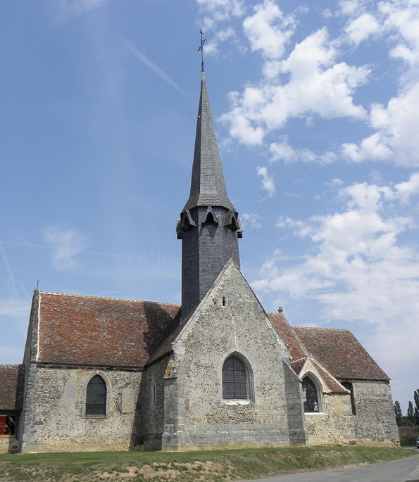 Vue méridionale de l'église de Saint-Christophe-sur-Avre (27).